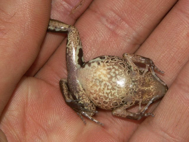 Cardioglossa leucomystax